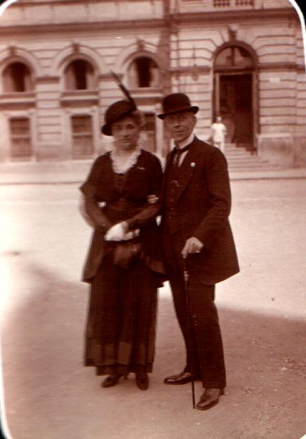 Irena Solska and Ludwik Solski in front of the Juliusz Słowacki Theatre in Kraków, 1916